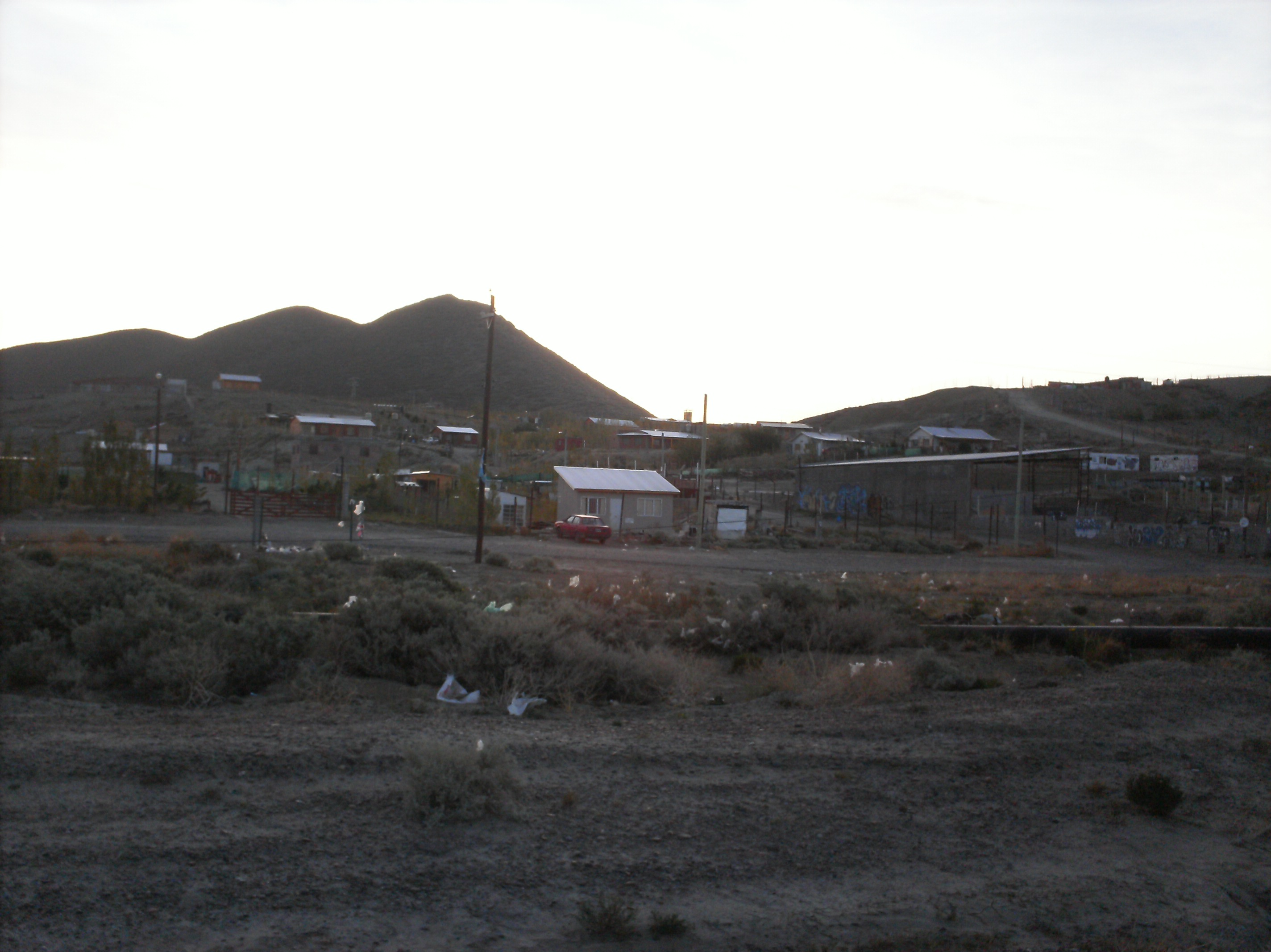 el barrio y algunas mesetas lindantes